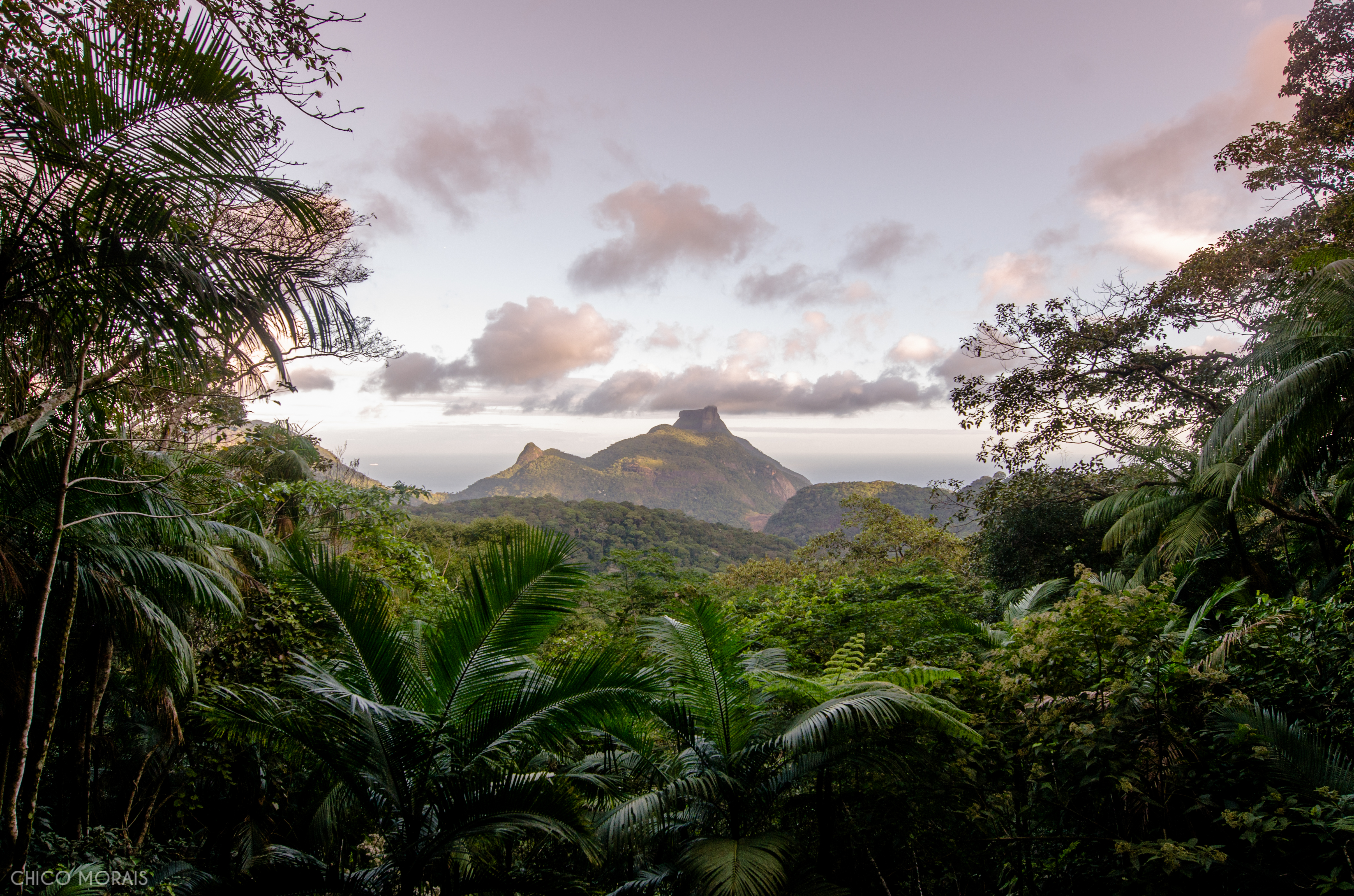 Pedra da Gávea, vista da da Floresta da Tijuca, Rio de Janeiro - RJ.